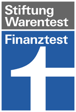 Logo of Finanztest (German magazine